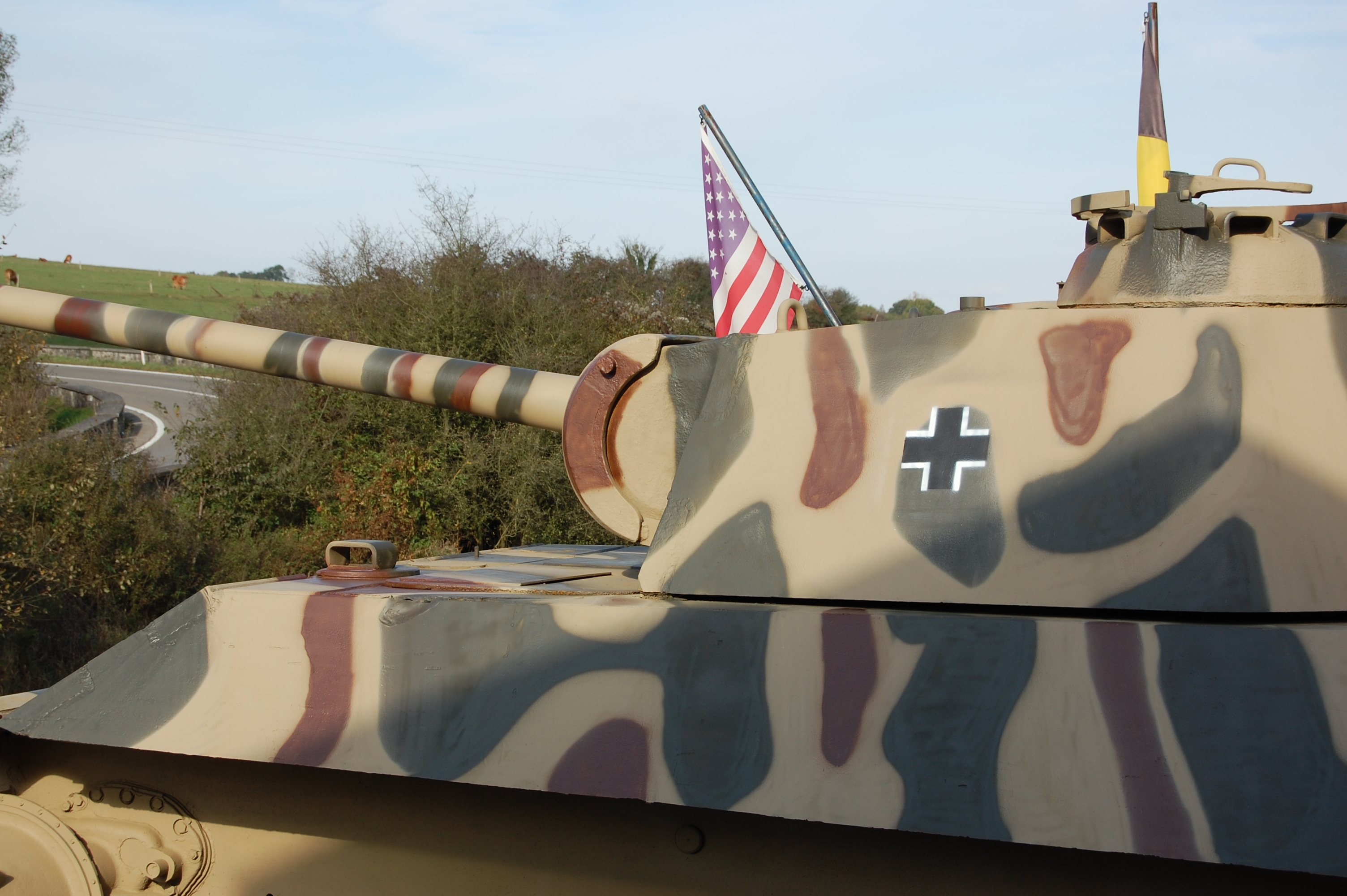 Panther Ausf G du carrefour de Celles